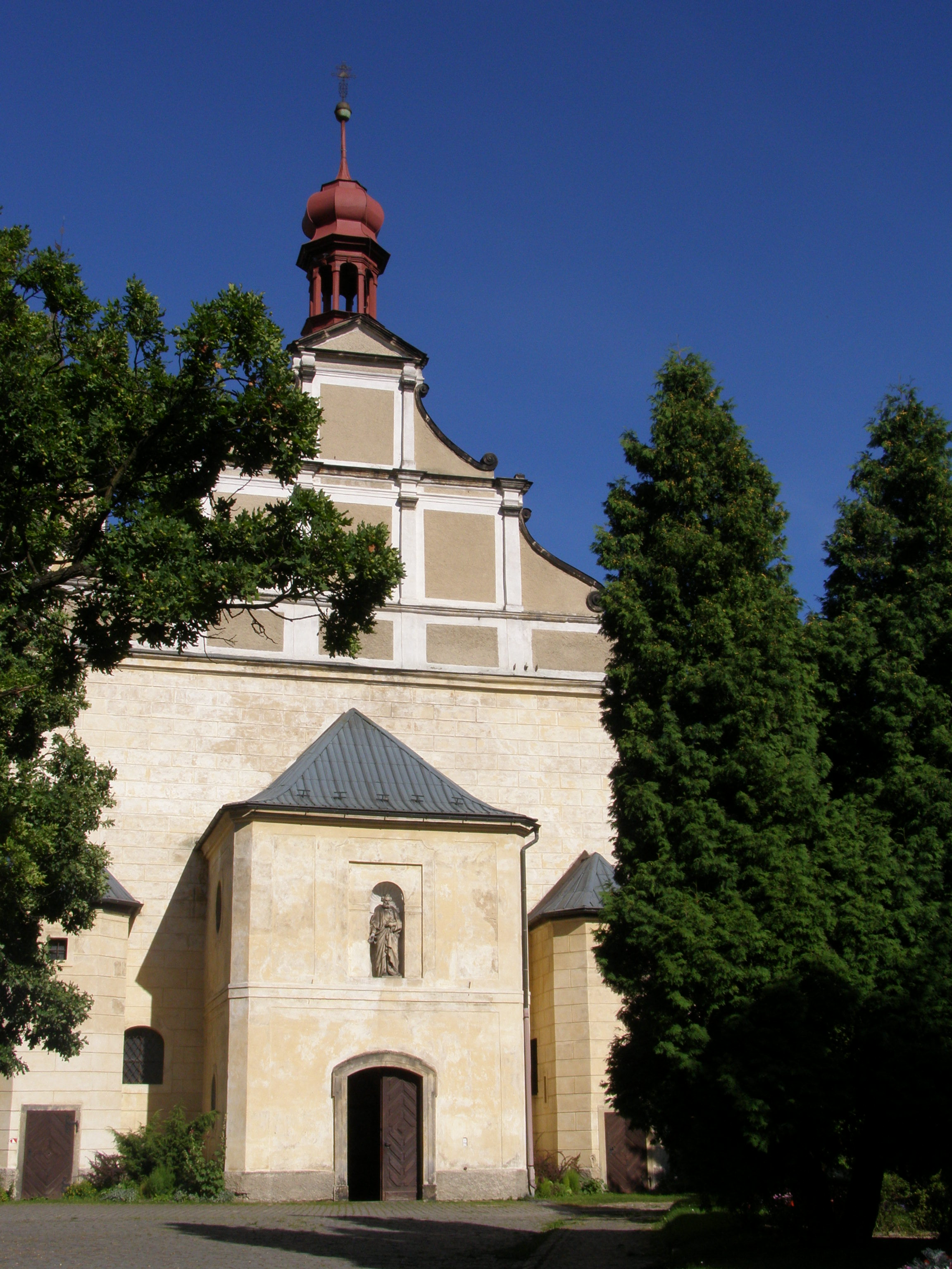 Česky: Frýdlant, kostel Nalezení svatého Kříže